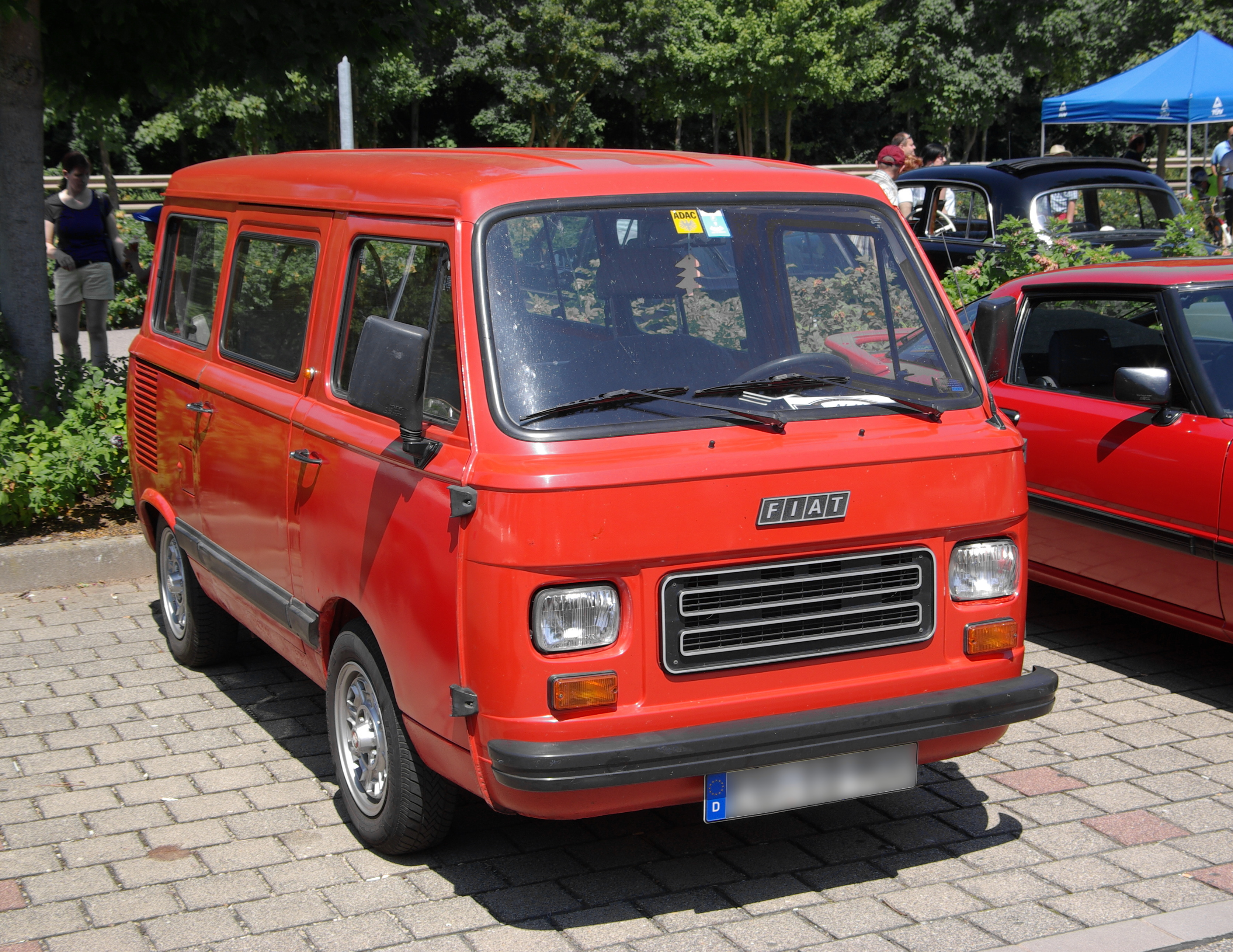 Fiat 900 E, 1983, 35 PS, 29. Internationales Oldtimer Treffen Konz